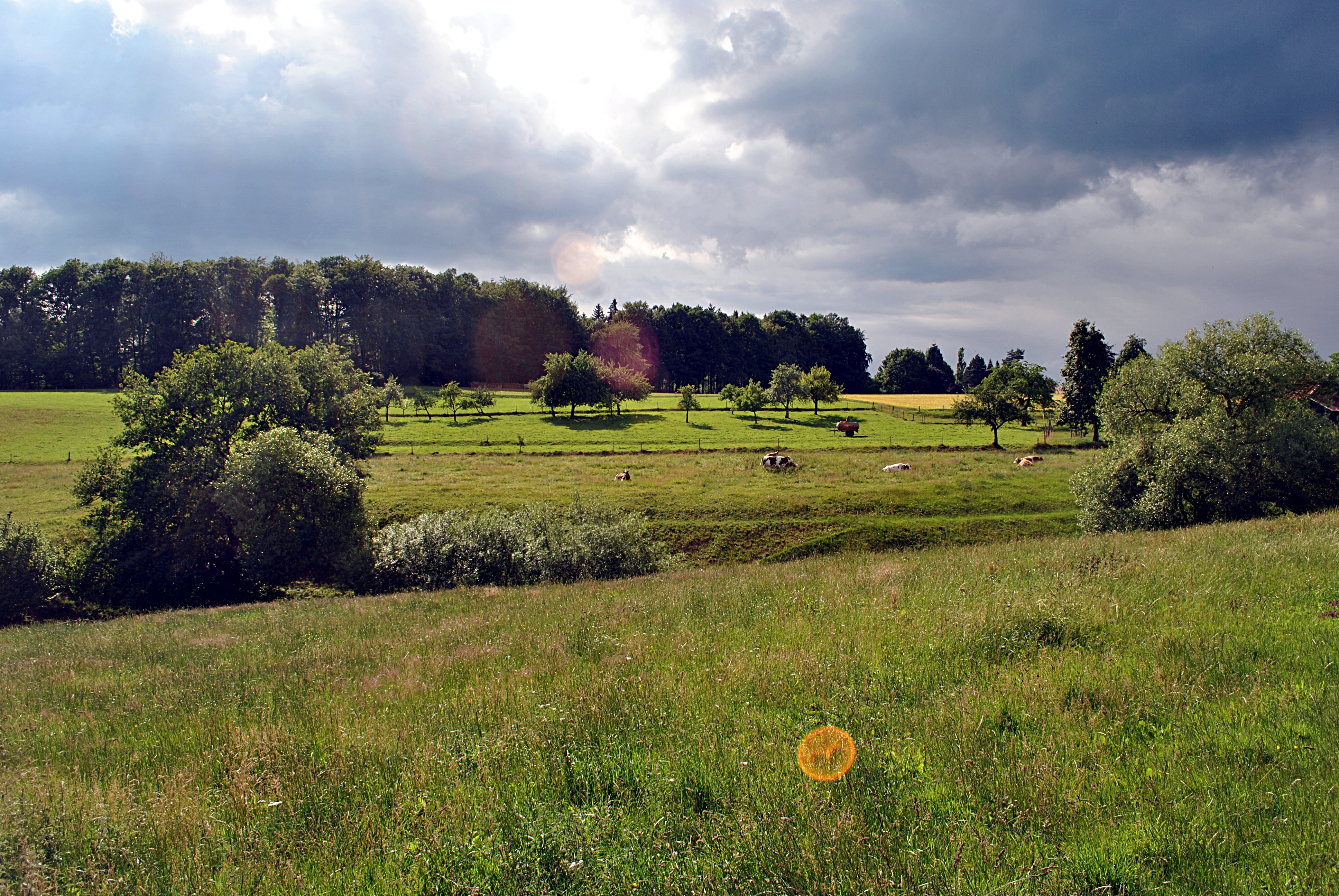 Landschaft suedlich des Ortsrands von Hesselbach